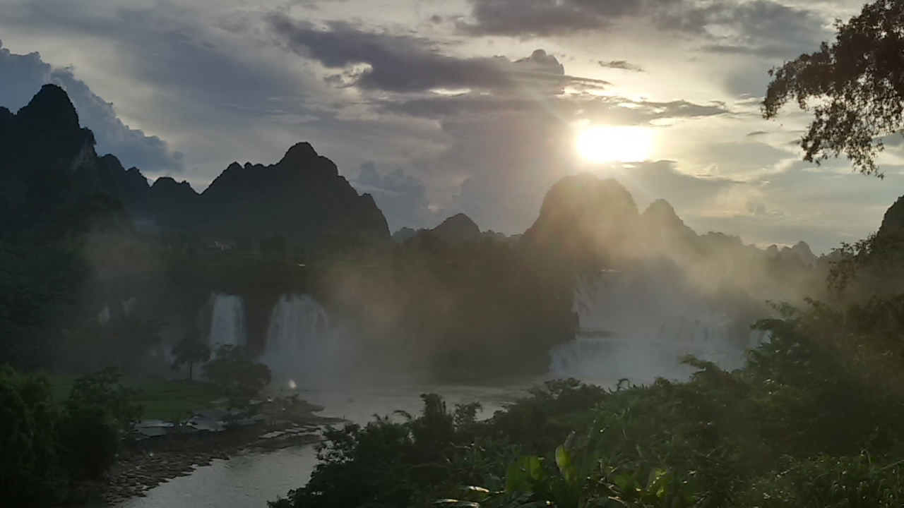 粵語: 喺公園大門望去德天瀑布嗰頭